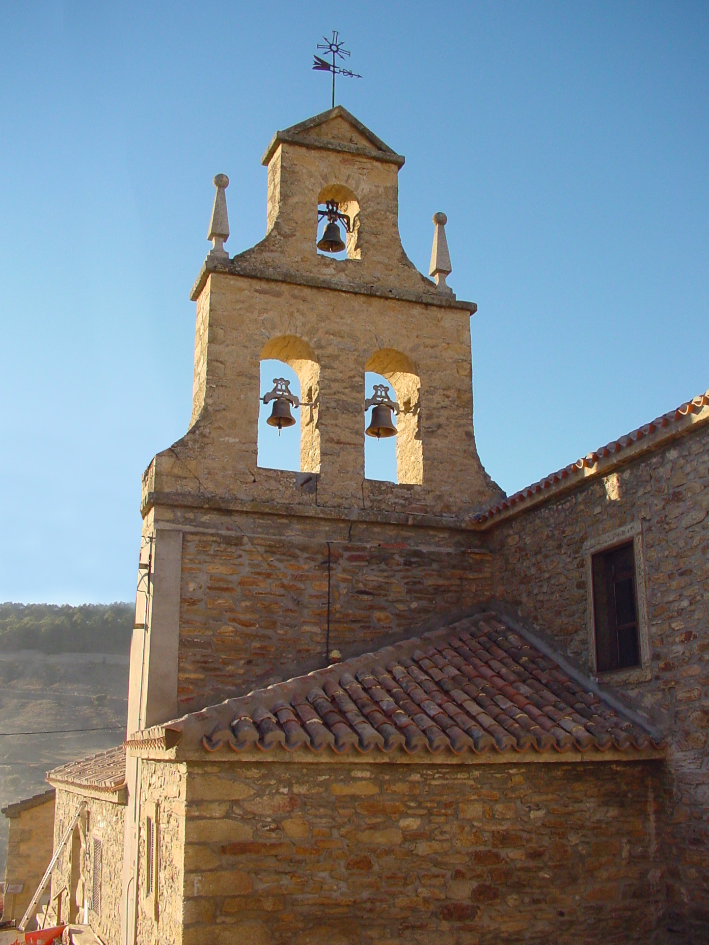 Vista de iglesia en Puentes Viejas.